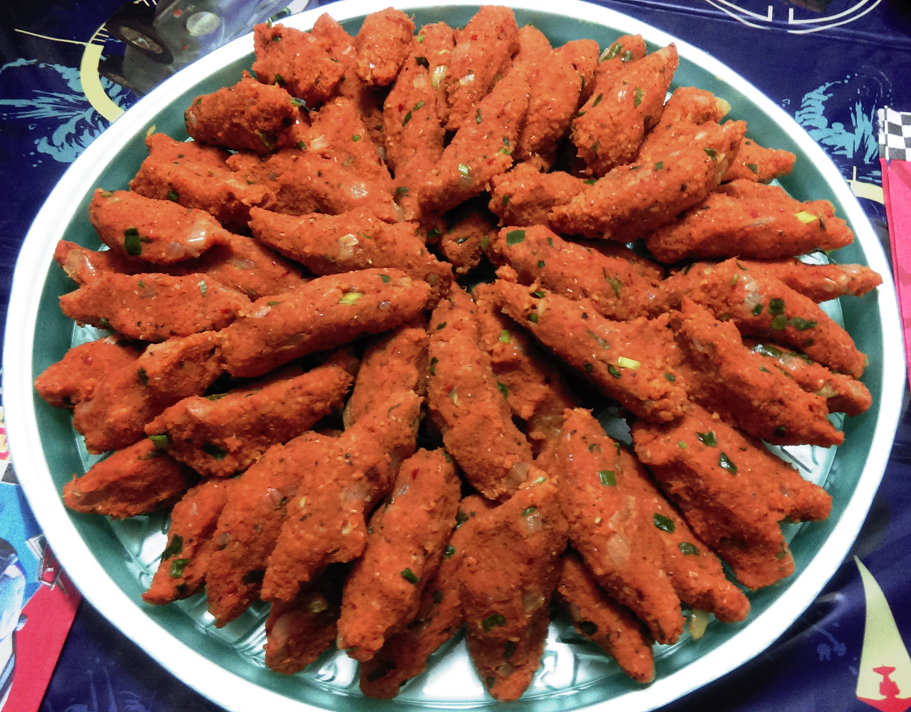 Ev yapımı mercimek köftesi.